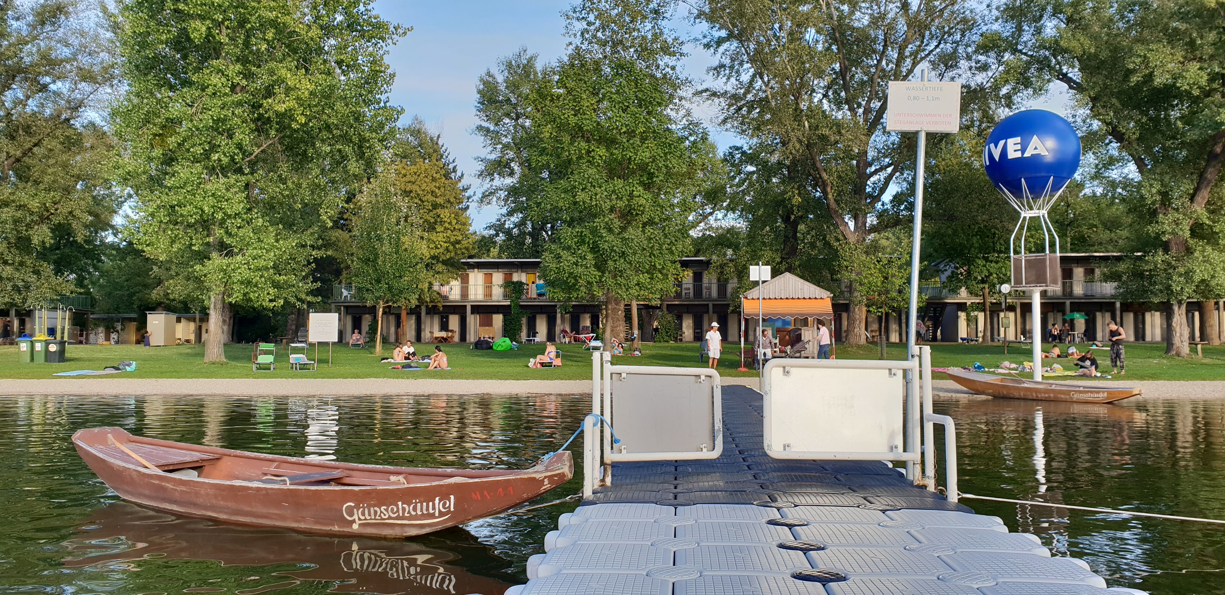 Strandbad Gänsehäufel - Sommerbad der Stadt Wien - Weststrand - September 2018